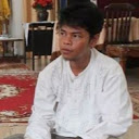 foto profile